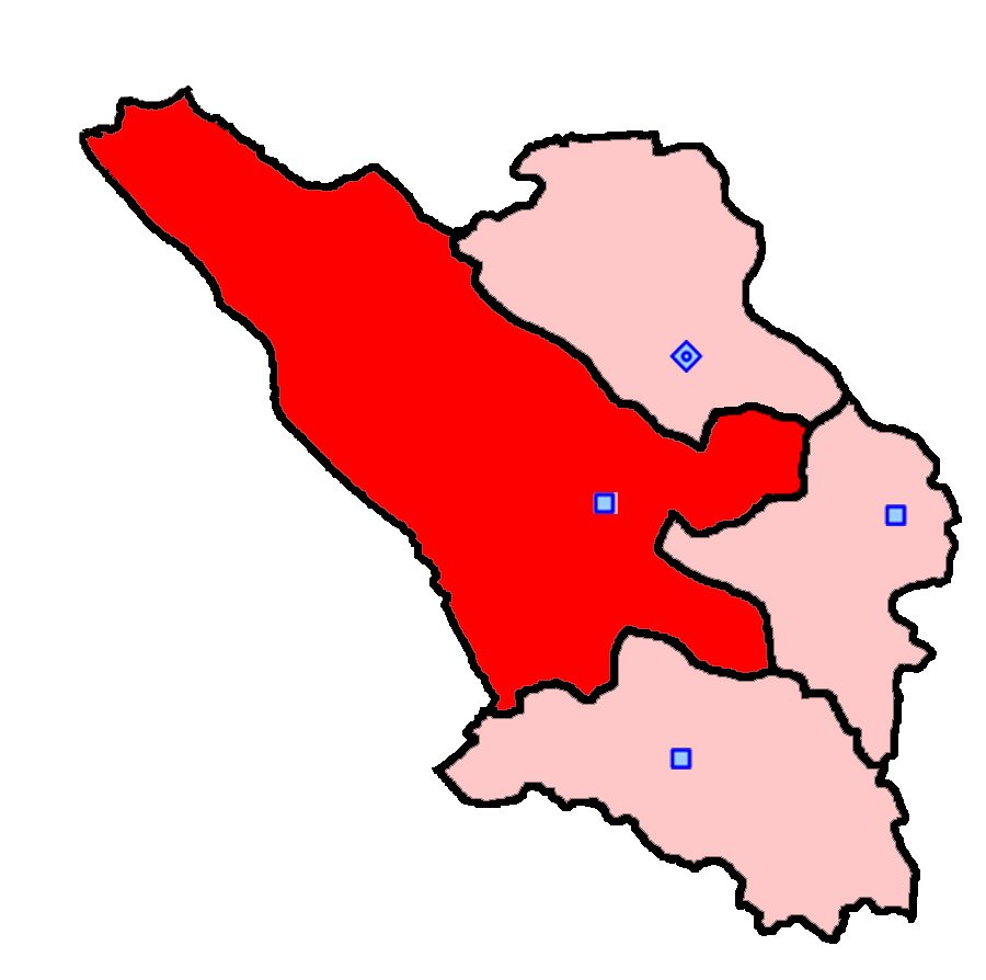 حوزهٔ انتخاباتی اردل و فارسان و کوهرنگ و کیار برای انتخابات مجلس شورای اسلامی